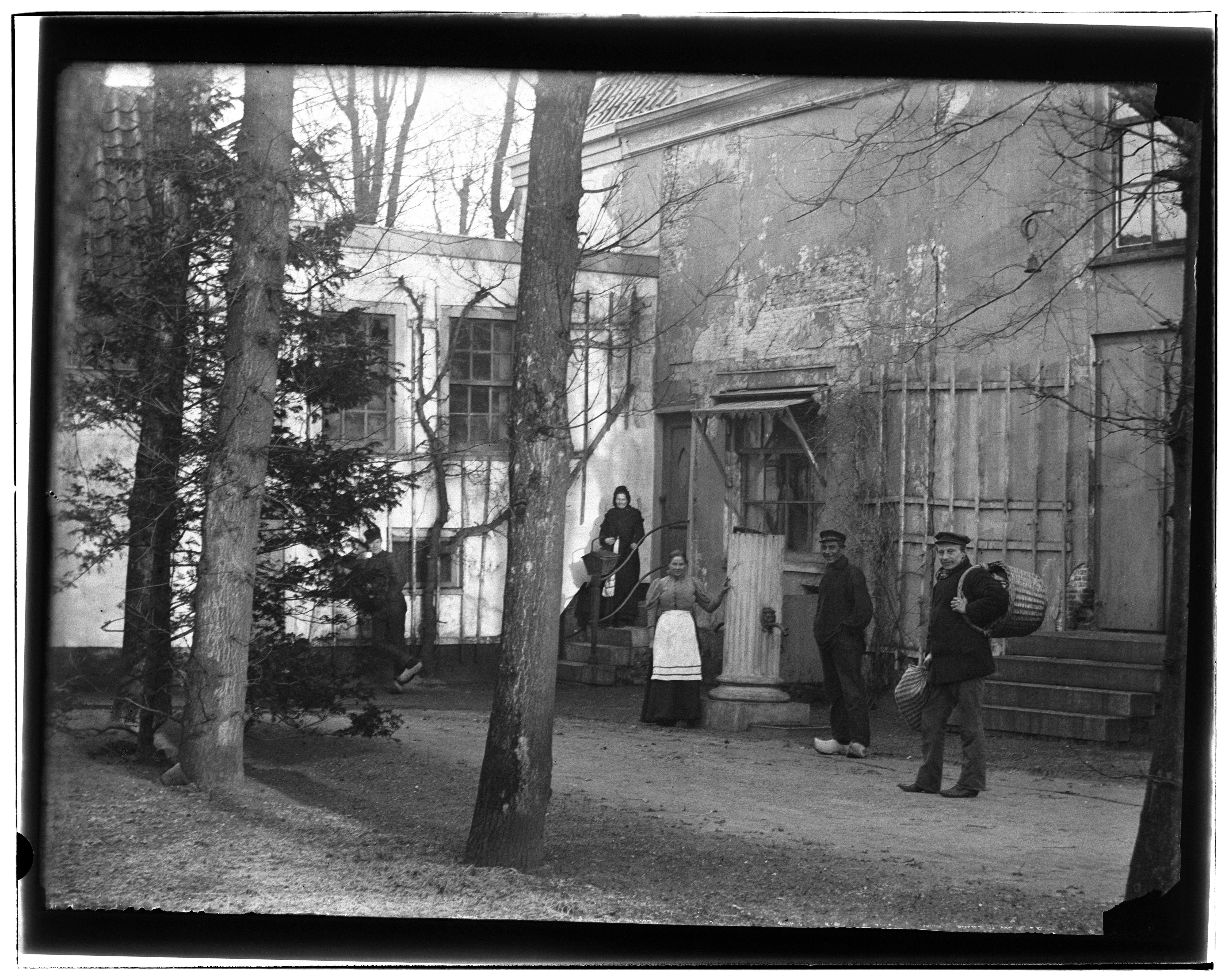 Beschrijving Amsteldijk t.h.v. 147 (voorheen 104) Buitenplaats Amstelvliet van de wed. Hart``, ten noorden van de watertoren. Documenttype foto Vervaardiger Olie``, Jacob (1834-1905) Collectie Collectie Jacob Olie Jbz. Datering 23 december 1897 Geografische naam Amsteldijk Inventarissen Afbeeldingsbestand 10019A001004 Generated with Dememorixer